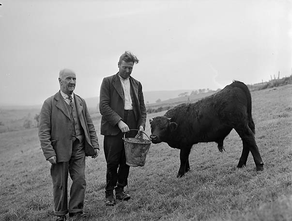 Teitl Cymraeg/Welsh title: Lluniau o Dryweryn, yn cynnwys ffermydd a phobl lleol Ffotograffydd/Photographer: Geoff Charles (1909-2002) Dyddiad/Date: 26/09/1957 Cyfrwng/Medium: Negydd ffilm / Film negative Cyfeiriad/Reference: (gch14232) Rhif cofnod / Record no.: 3370635 Rhagor o wybodaeth am gasgliad Geoff Charles yn Llyfrgell Genedlaethol Cymru More information about the Geoff Charles Collection at the National Library of Wales Mae ffotograffau Geoff Charles hefyd yn rhan o Broject Europeana Libraries Geoff Charles' photographs also form part of the Europeana Libraries Project